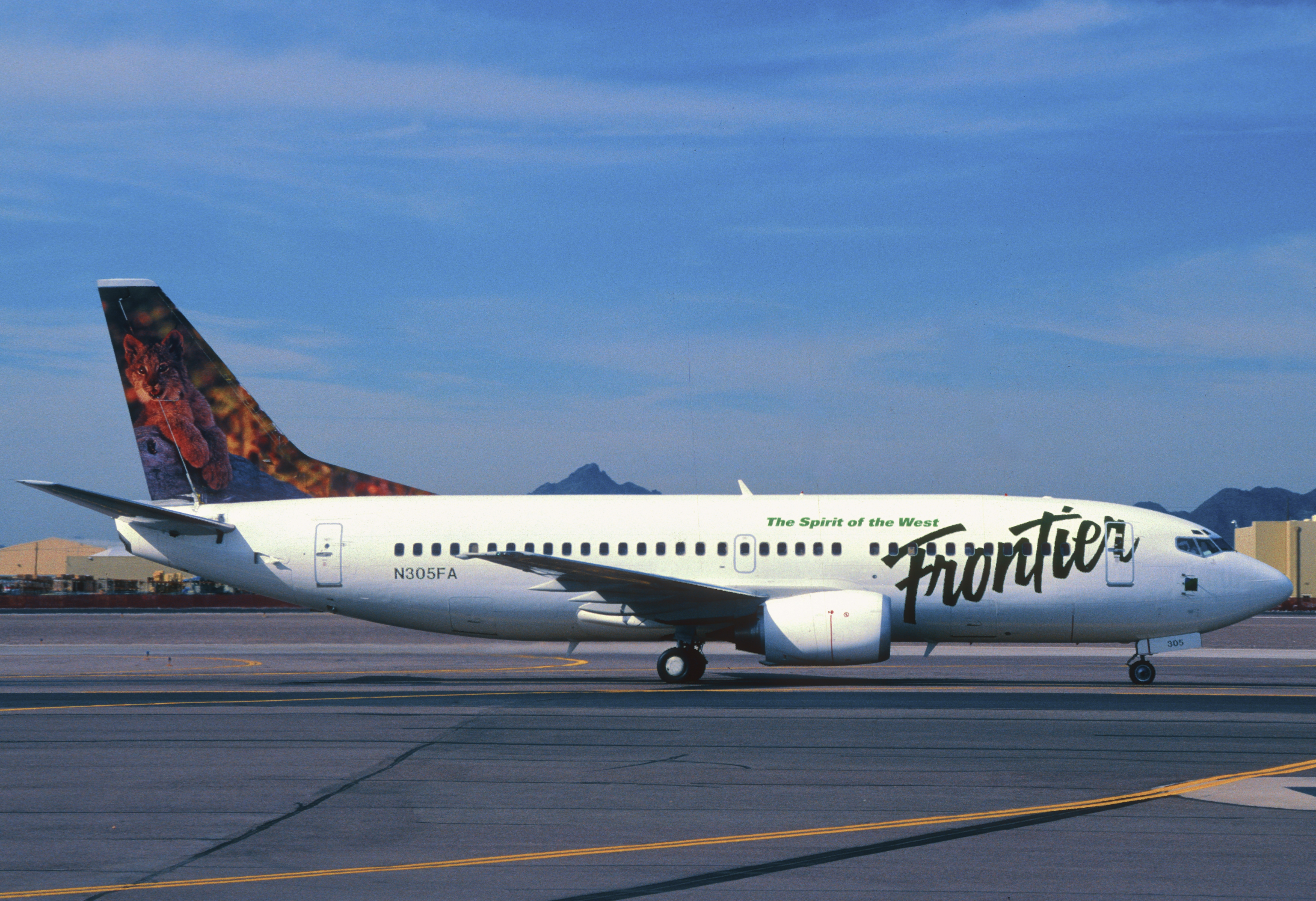 Frontier Airlines Boeing 737-36Q; N305FA, April 1998/ DUO